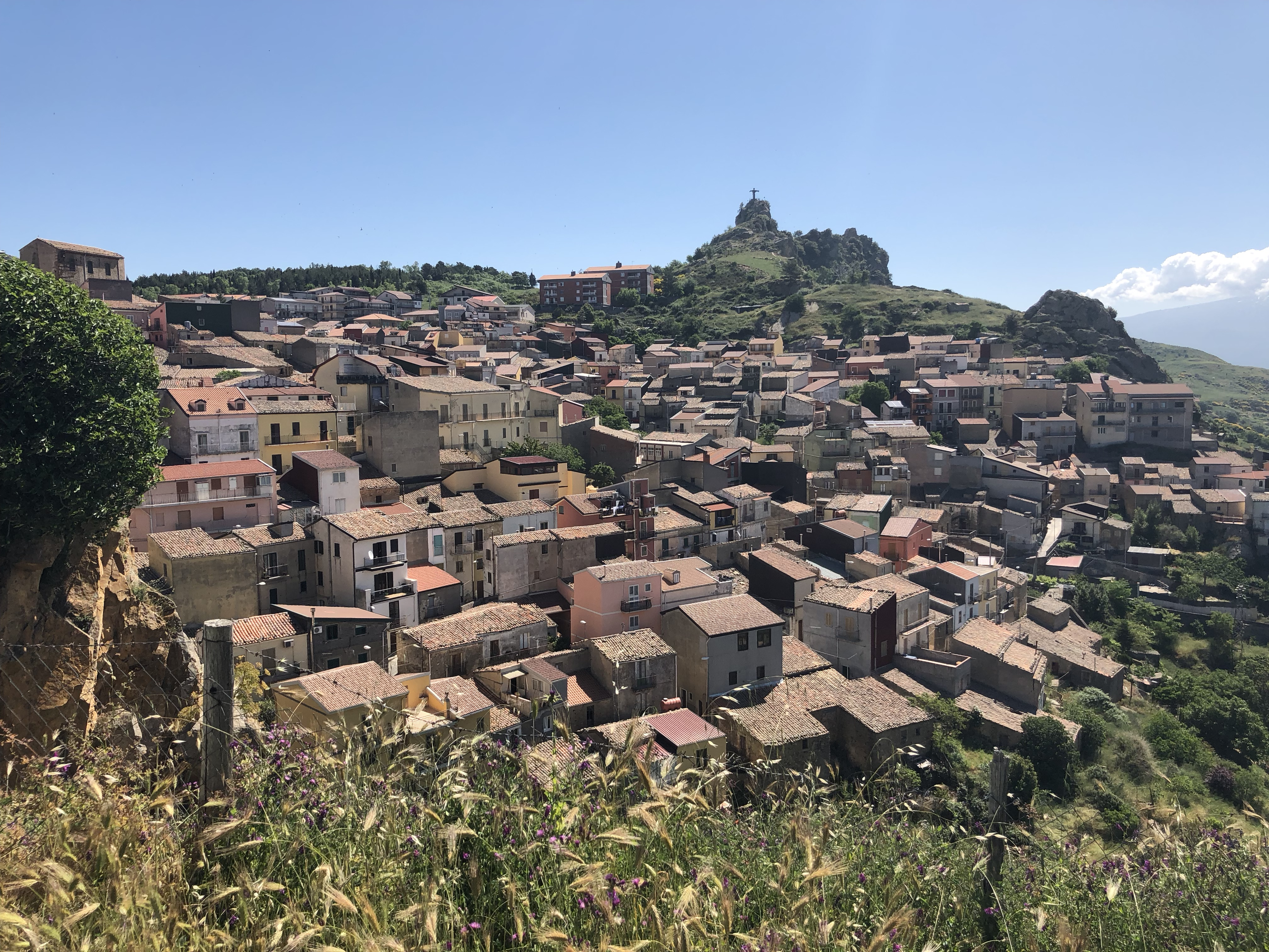 Panorama di Cesarò